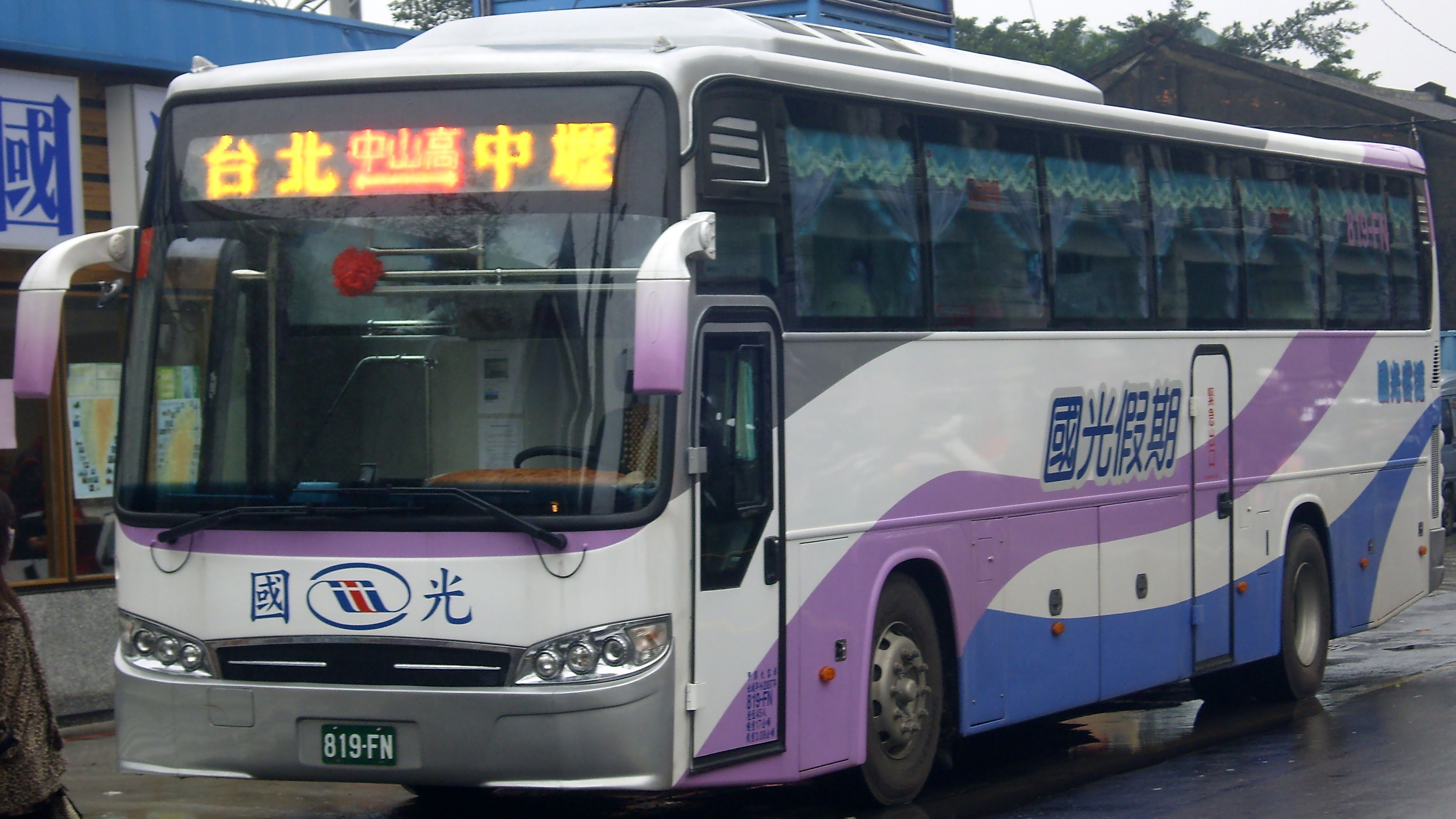 Kou-kwang Bus: Daewoo BX212T.